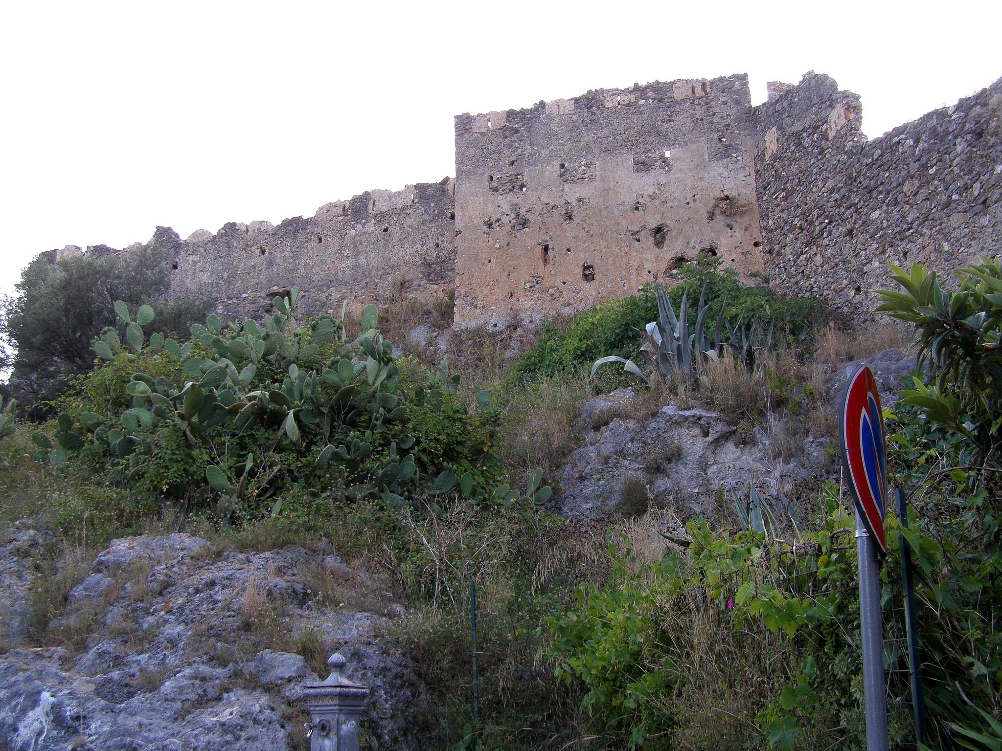 Normanský hrad v starom meste